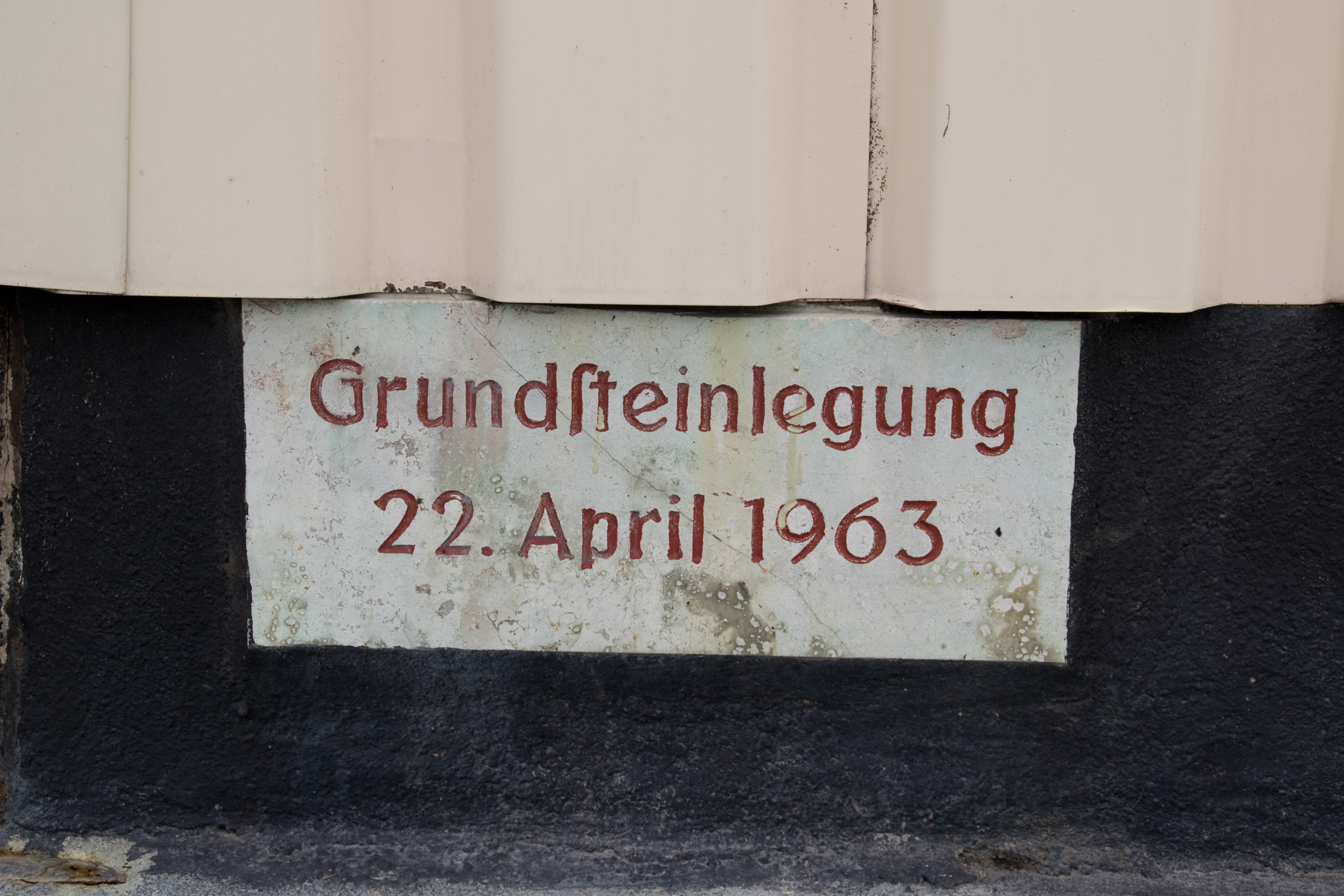 Hinweistafel zur Grundsteinlegung im Sockel des Aussichtsturms Thüringer Warte bei Ludwigsstadt.